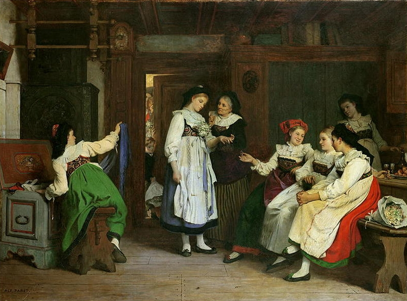 Une noce en Basse-Alsacetitle QS:P1476,fr:"Une noce en Basse-Alsace" label QS:Lfr,"Une noce en Basse-Alsace"